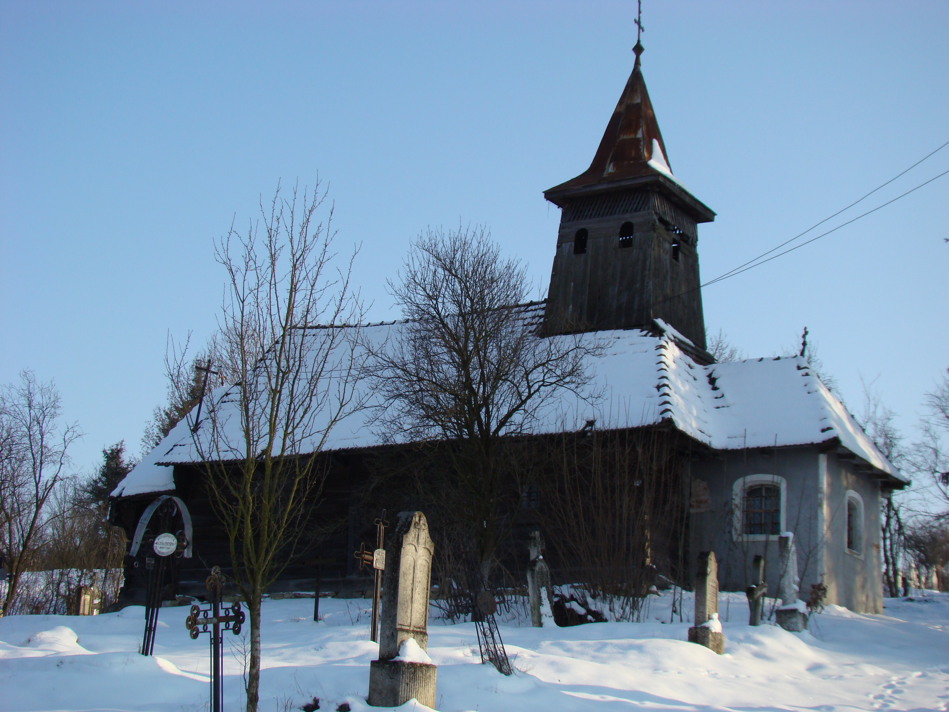 Biserica de lemn din Gârbău, județul Cluj